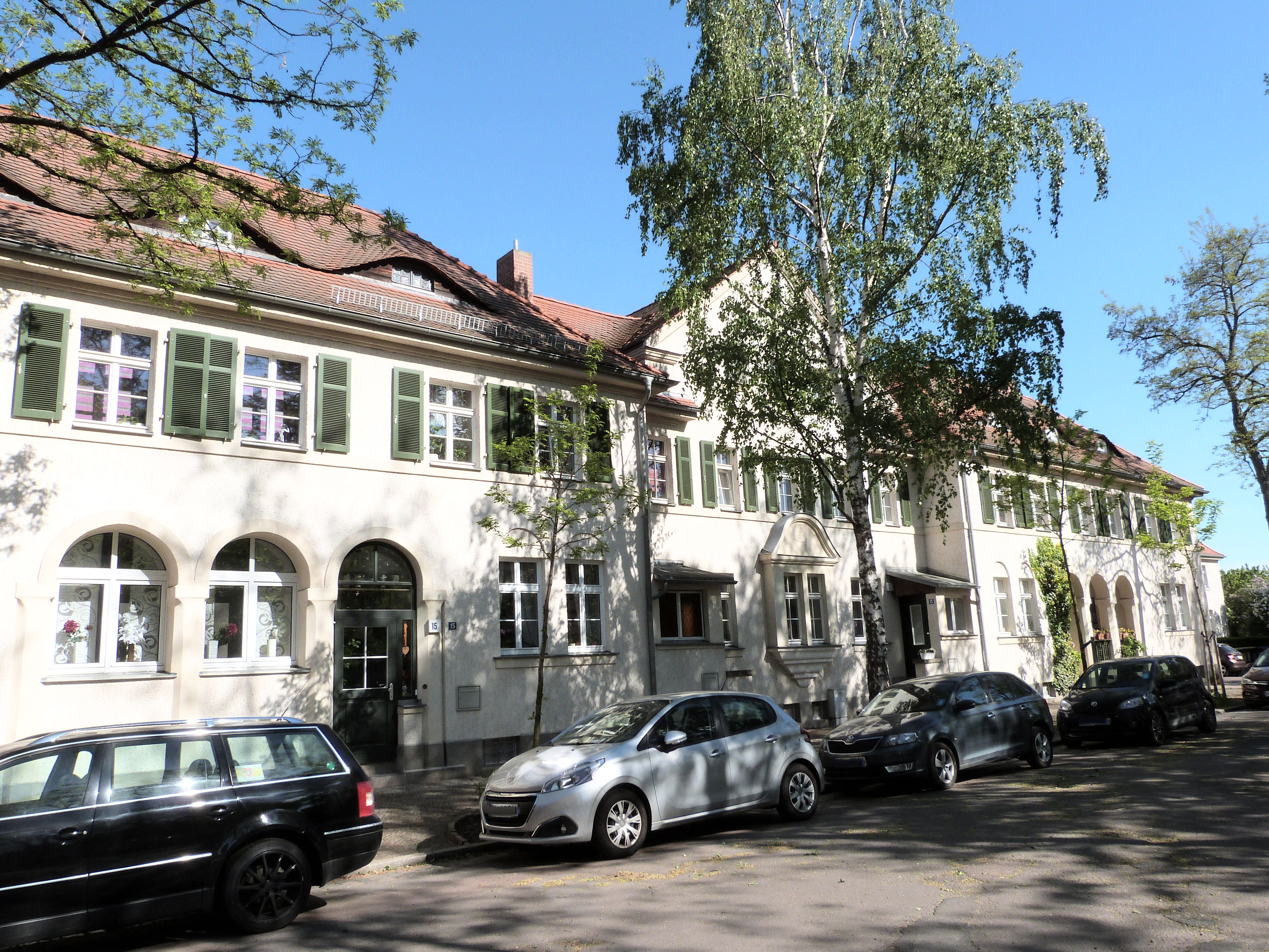 Thaerviertel, Halle (Saale)